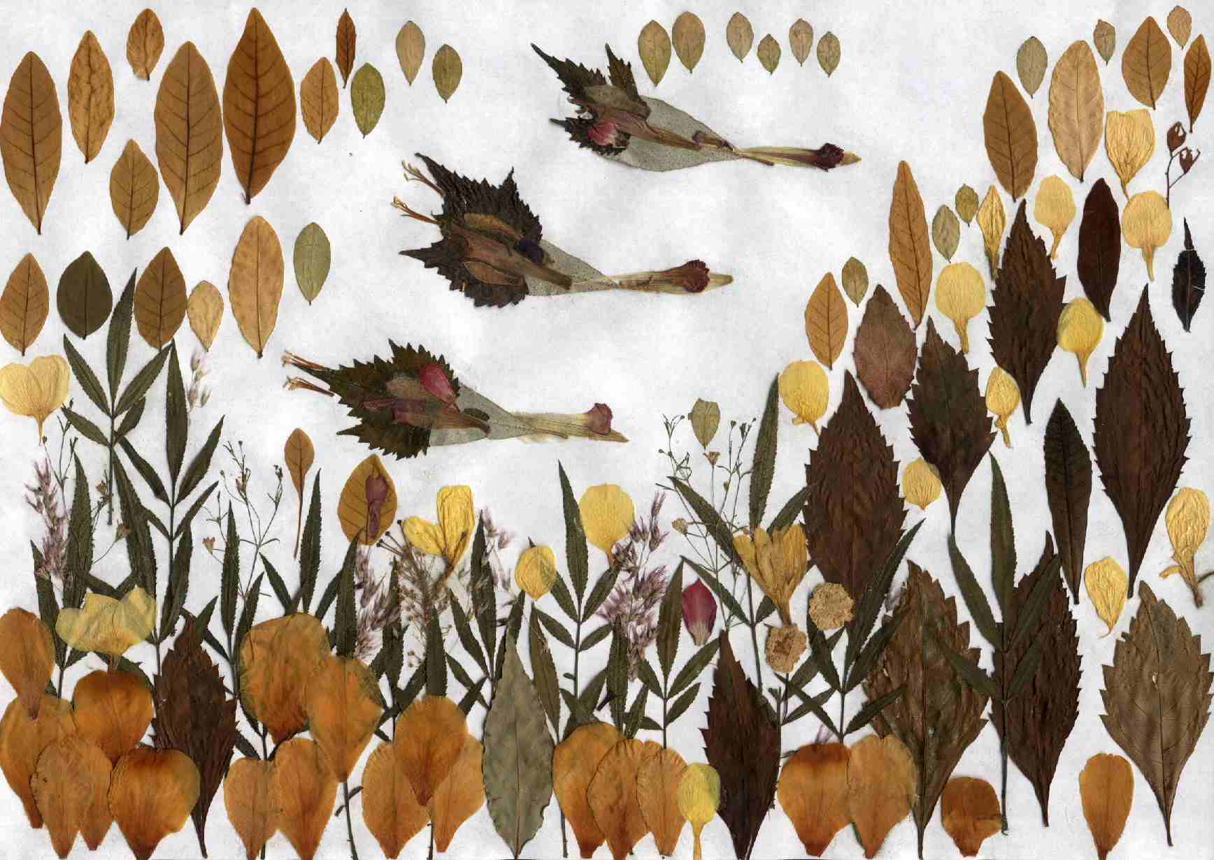 Pressed flowers: Wild geese 押花：雁